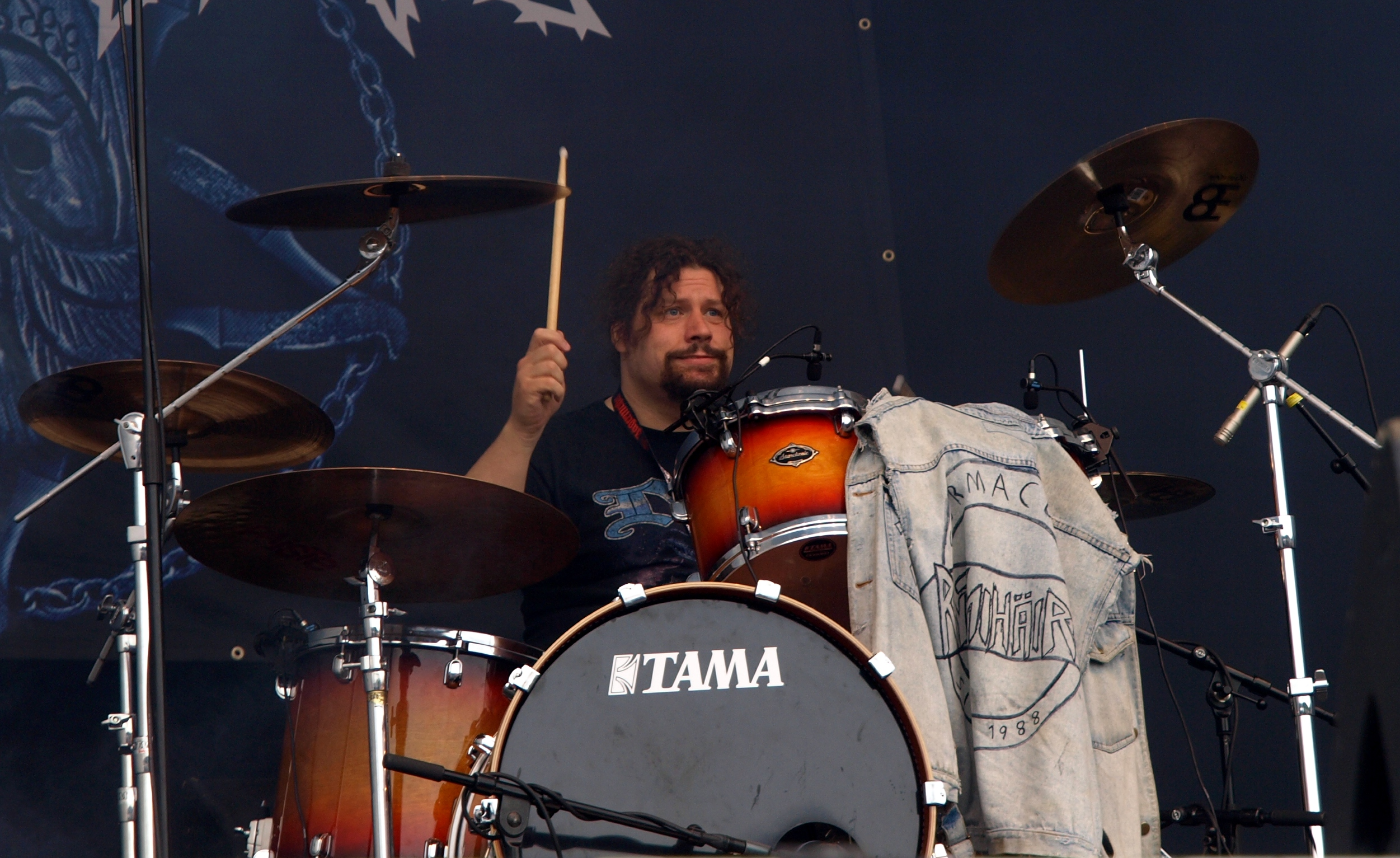 Rytmihäiriö live am Myötätuulirock 2011